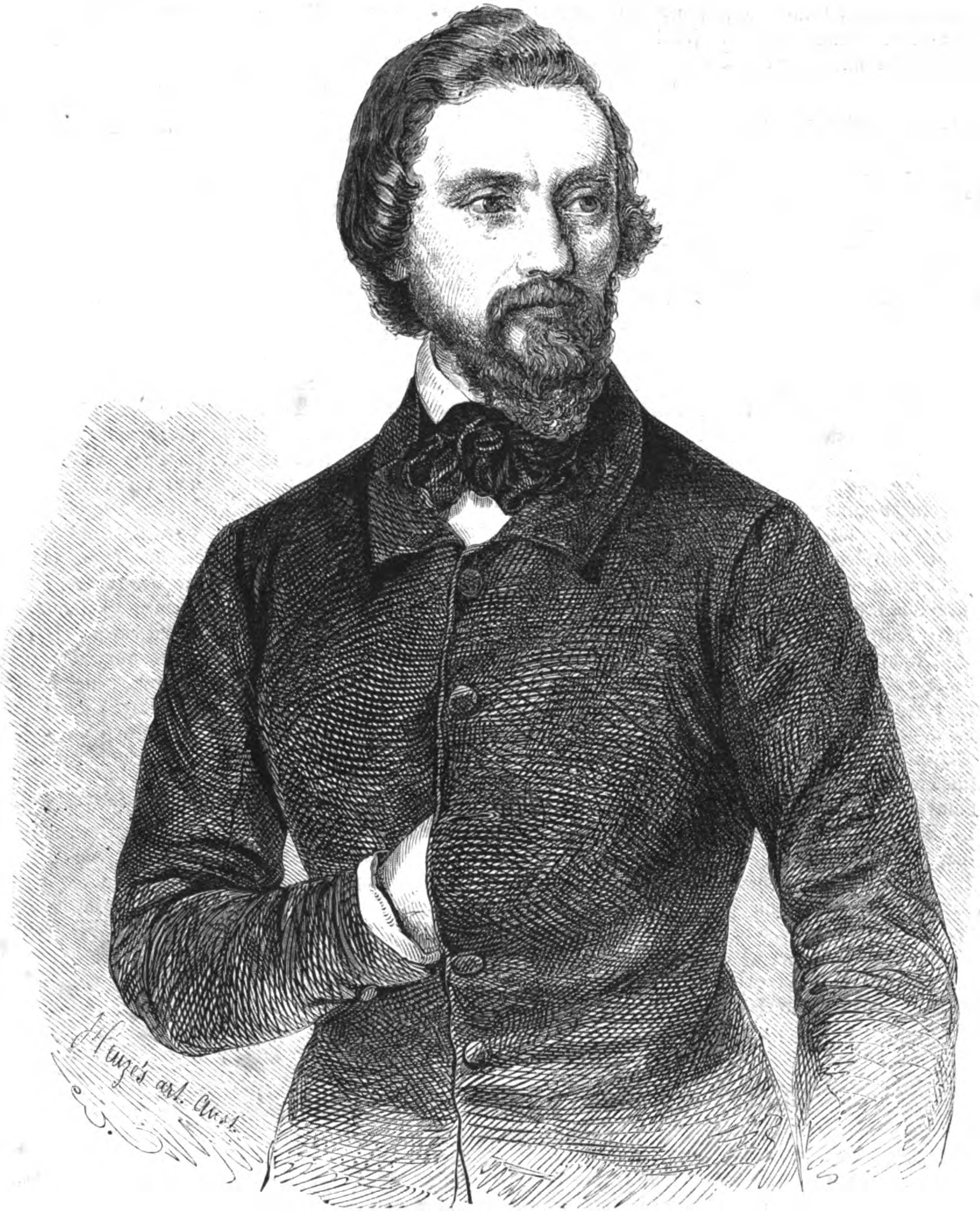 Eduard Duller, deutsch-österreichischer Dichter im 19. Jh.